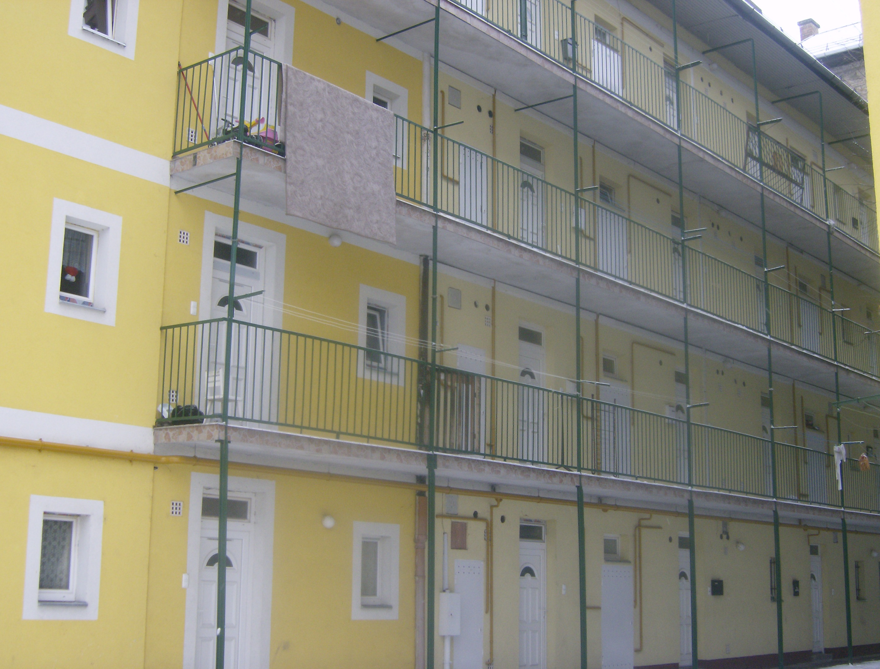 Budapest, Bihari út 8/c, szükséglakások 1932-ből, felújított oldal